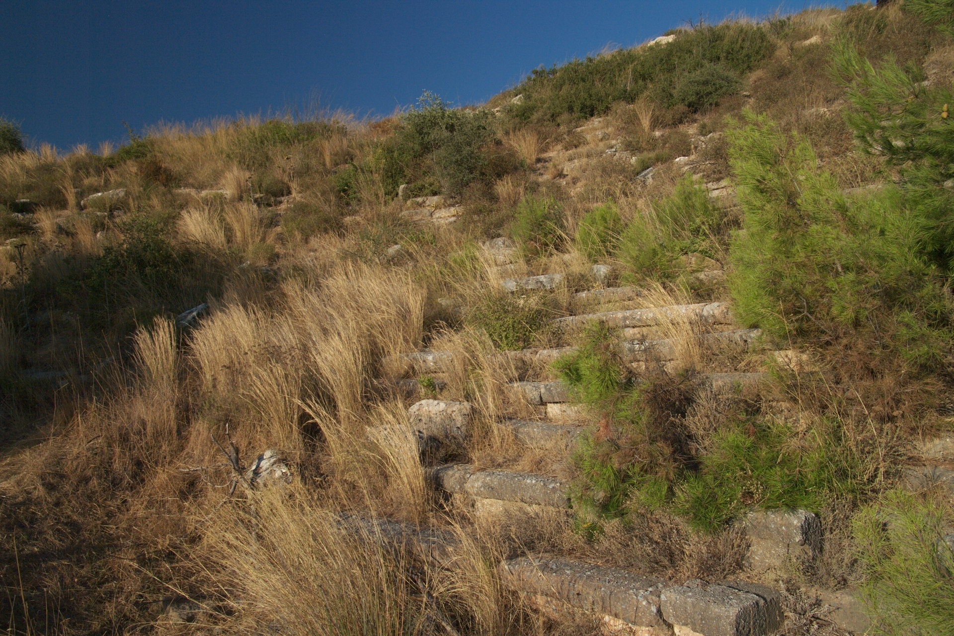 Нотион.Театр.